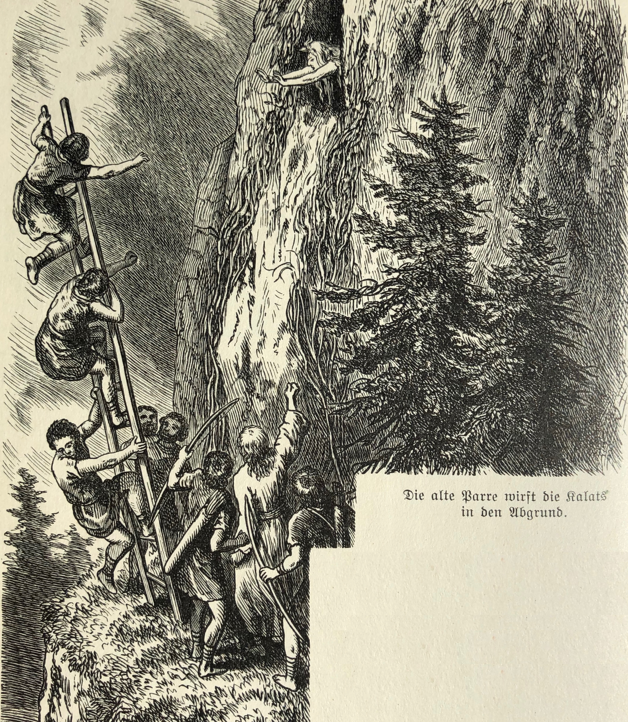 Illustrationen von Heinrich Leutemann aus dem Buch "Rulaman" von David Friedrich Weinland.